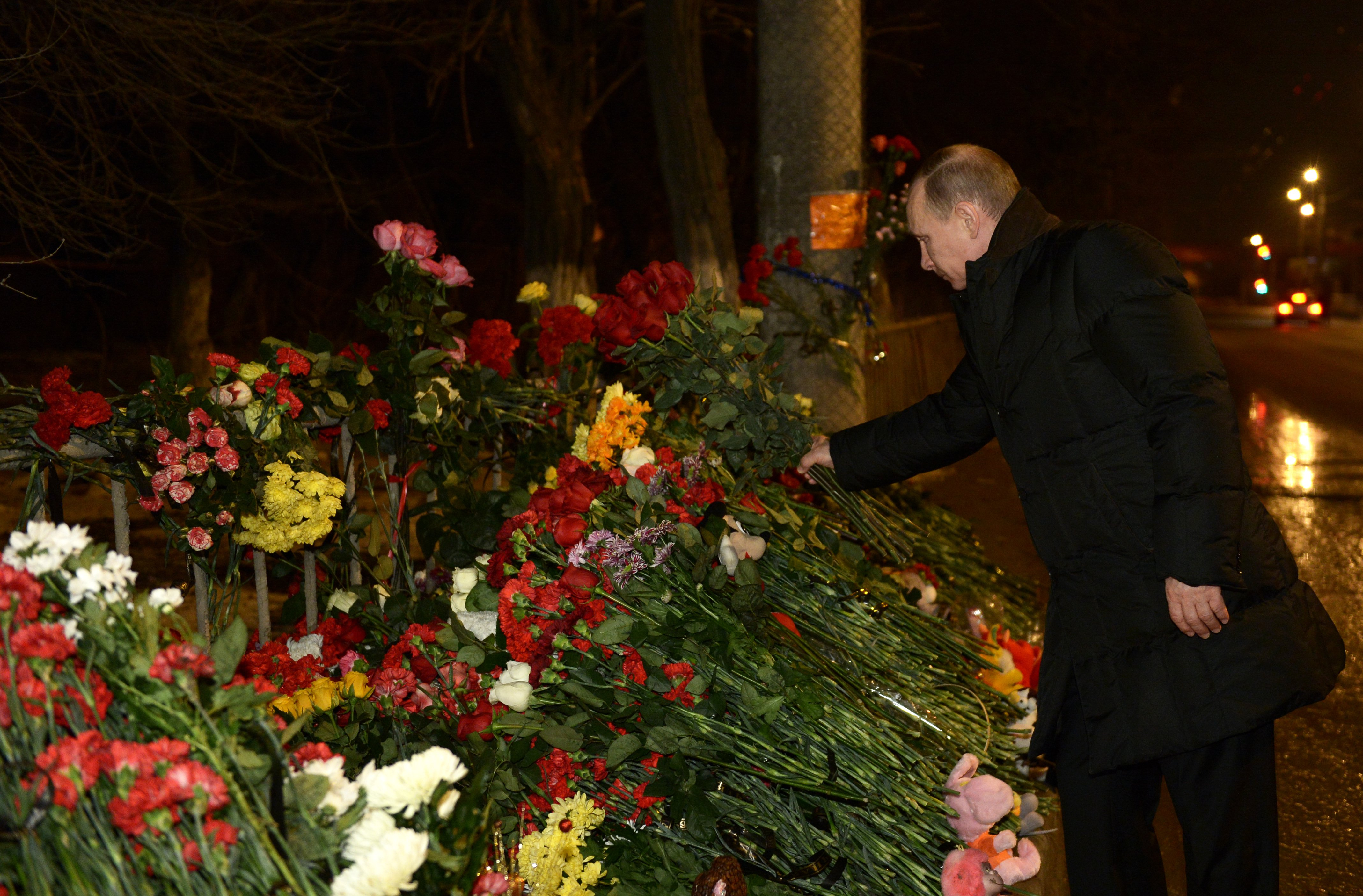 Attentats de décembre 2013 à Volgograd, Vladimir Poutine, président de la Russie, rend hommage le 1er janvier 2014 aux victimes de l'attentat-suicide survenu dans un des trolleybus.